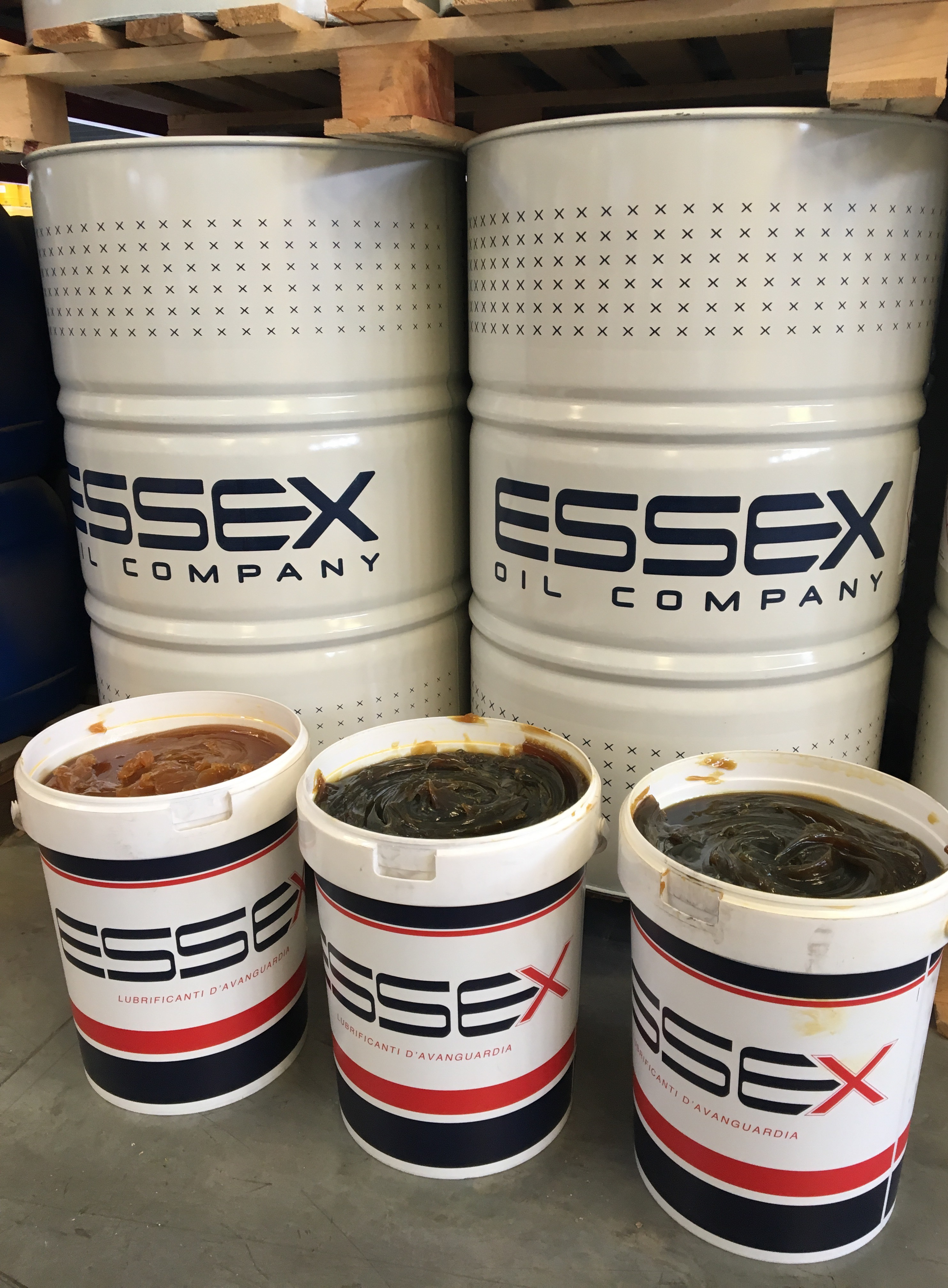 Grasso ESSEX OIL COMPANY in secchi